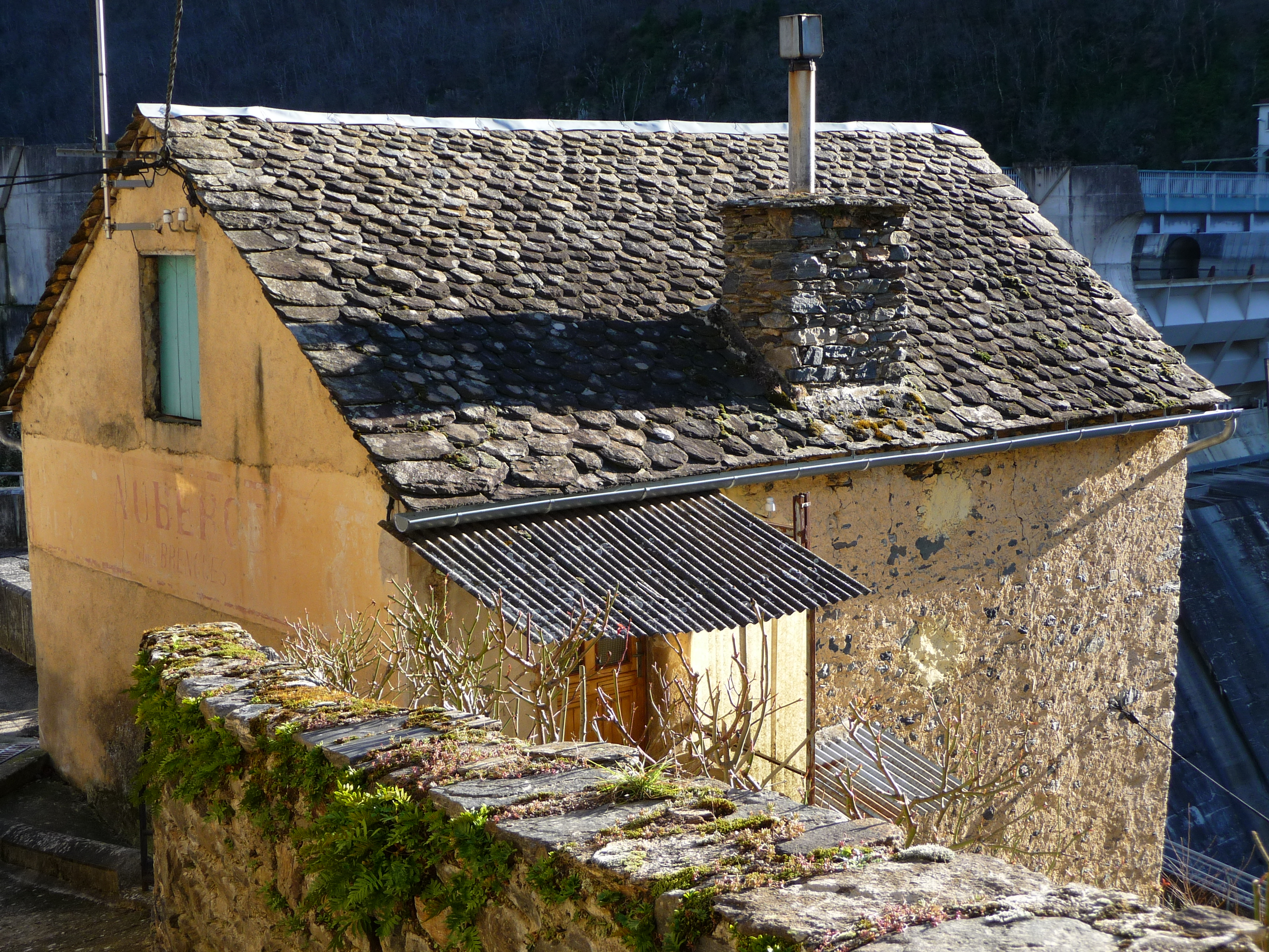 Lausàs, peiretas frejàls (sistre), miegjorn Roergue Lausás, peyrétos frejáls (sístre), mièchjoúr Roergue (abbé Vayssier dialècte roergat)